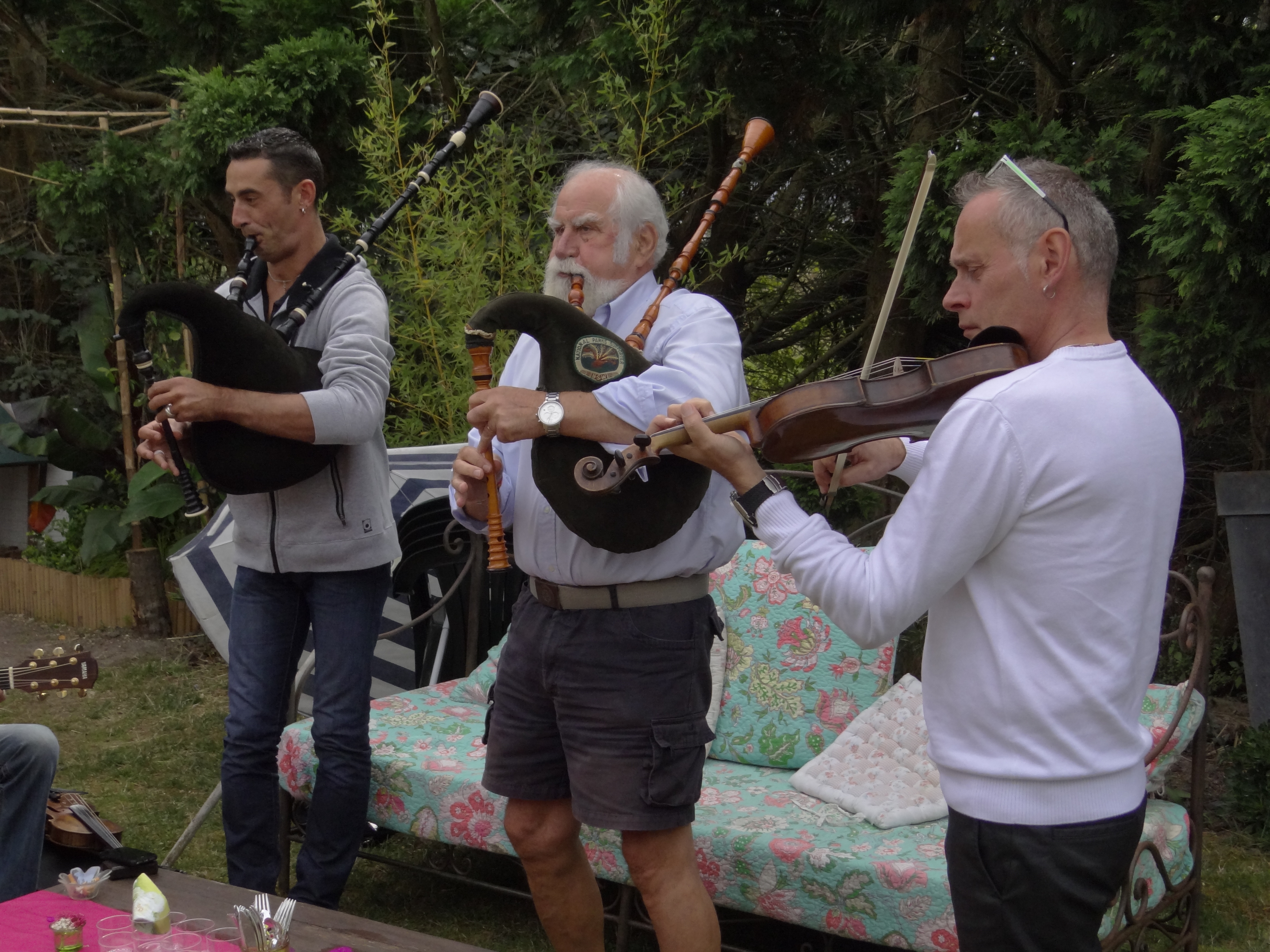 Emmanuel Vrignaud et Lucien Proux créateur avec Thierry Bertrand de l'Ecole de veuze de La Garnache.